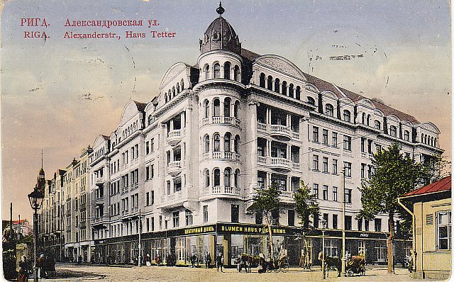 Дім Тетера на розі вулиць Александра й Стабу.